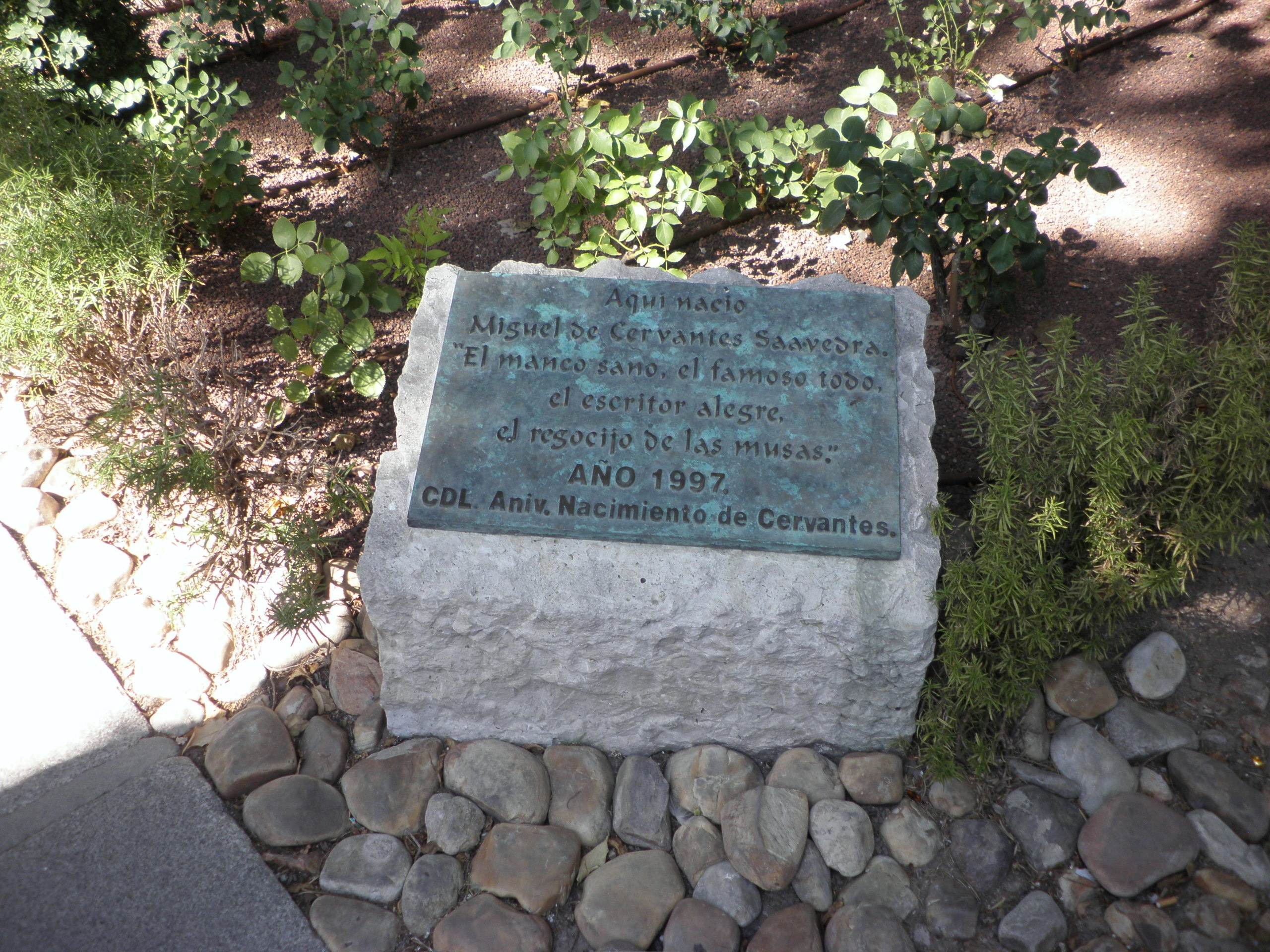 Casa natal de Miguel de Cervantes, Alcalá de Henares, España.